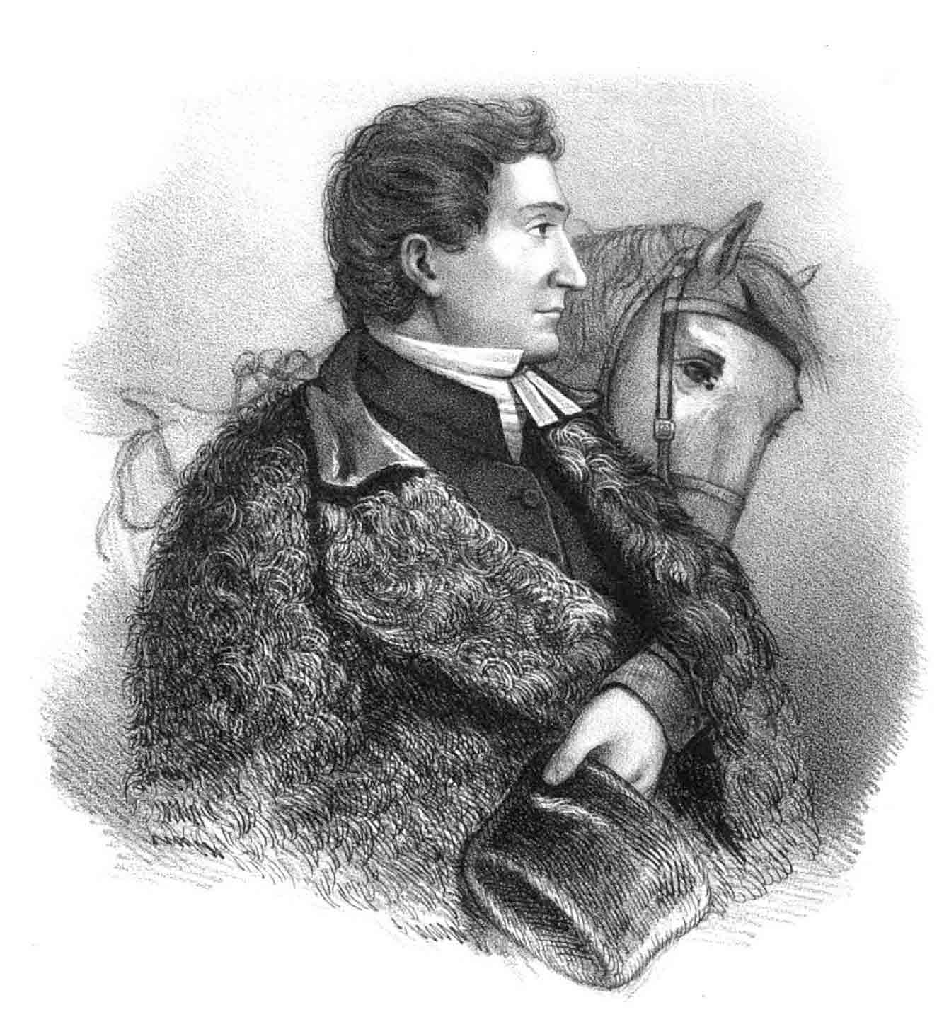 Petrus Laestadius (1802-1841), evangelical vicar